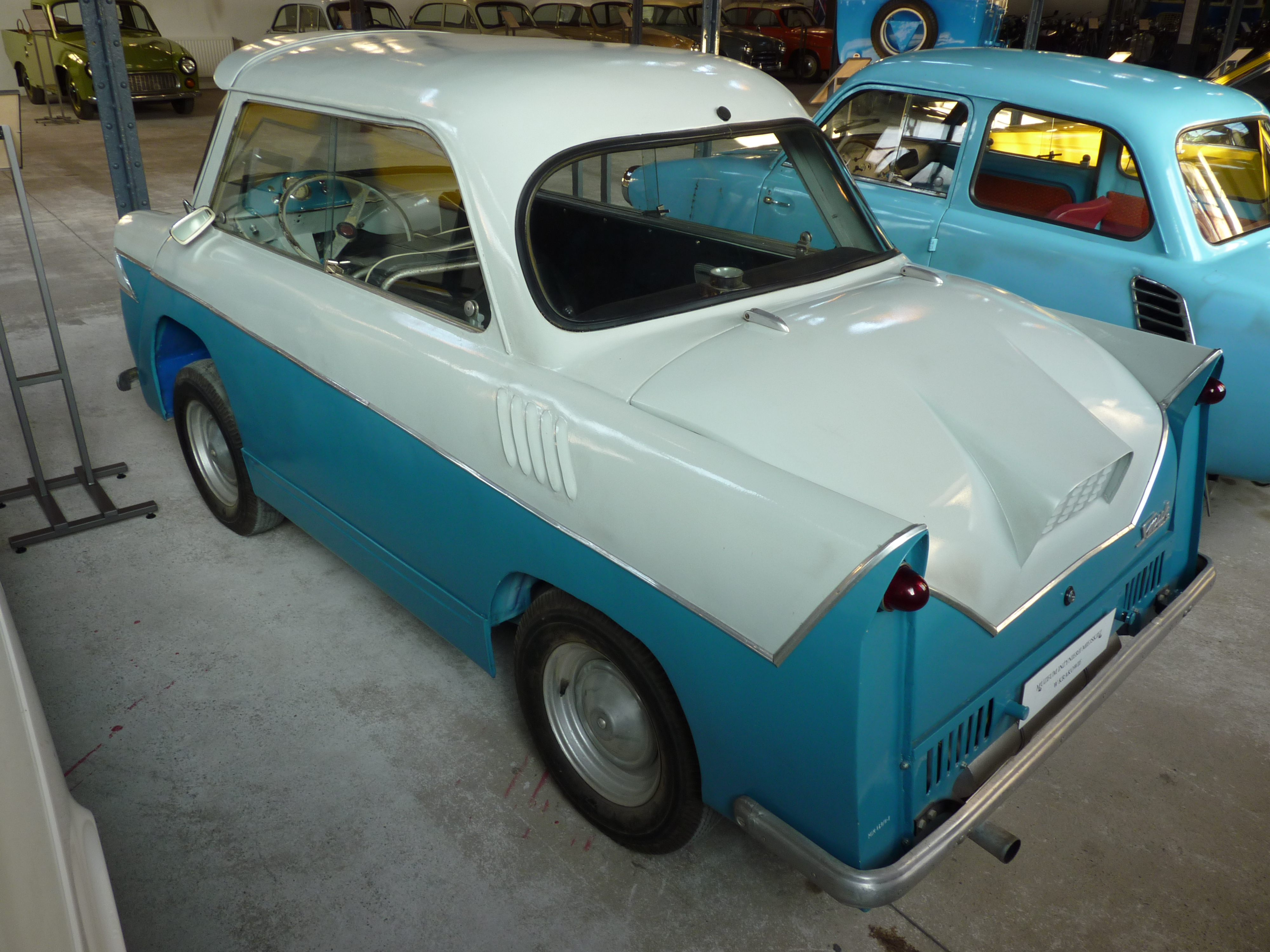 Smyk at Muzeum inżynierii Miejskiej in Kraków.